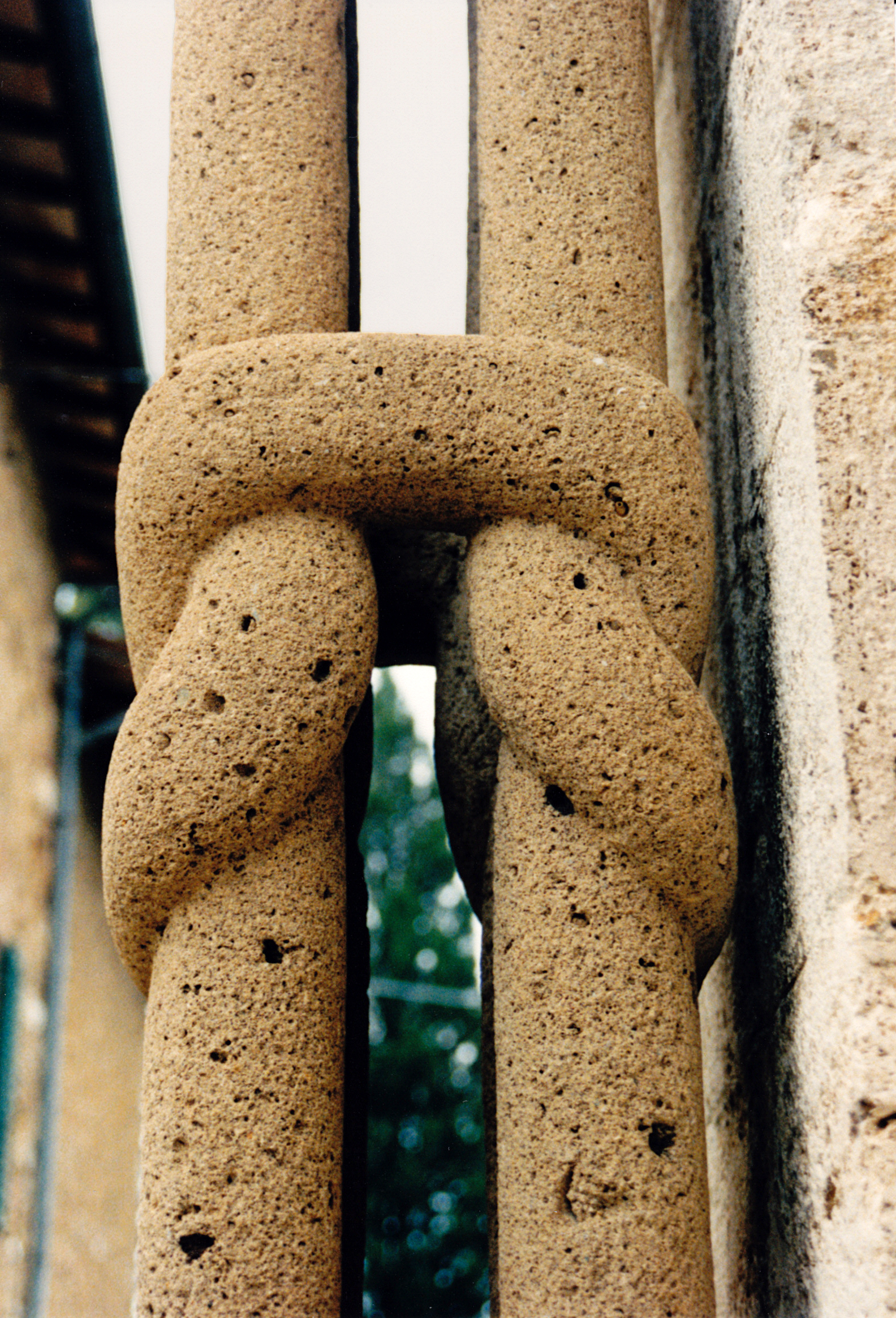 Italie - Toscane - Collégiale de San Quirico d'Orcia